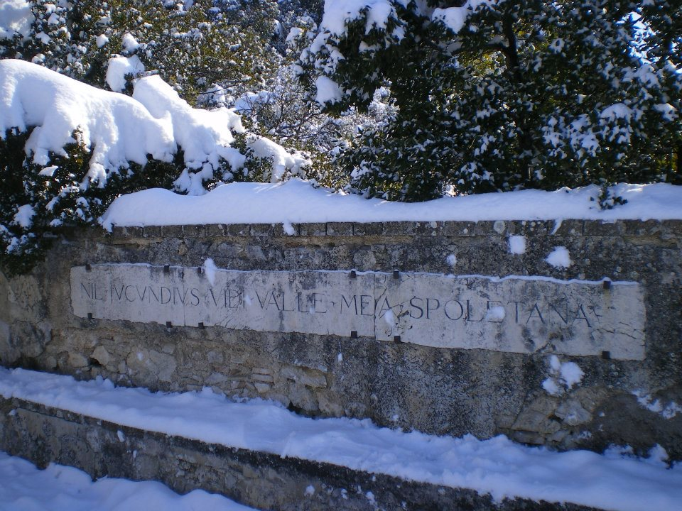 Belvedere di Monteluco: lapide con citazione di S. Francesco